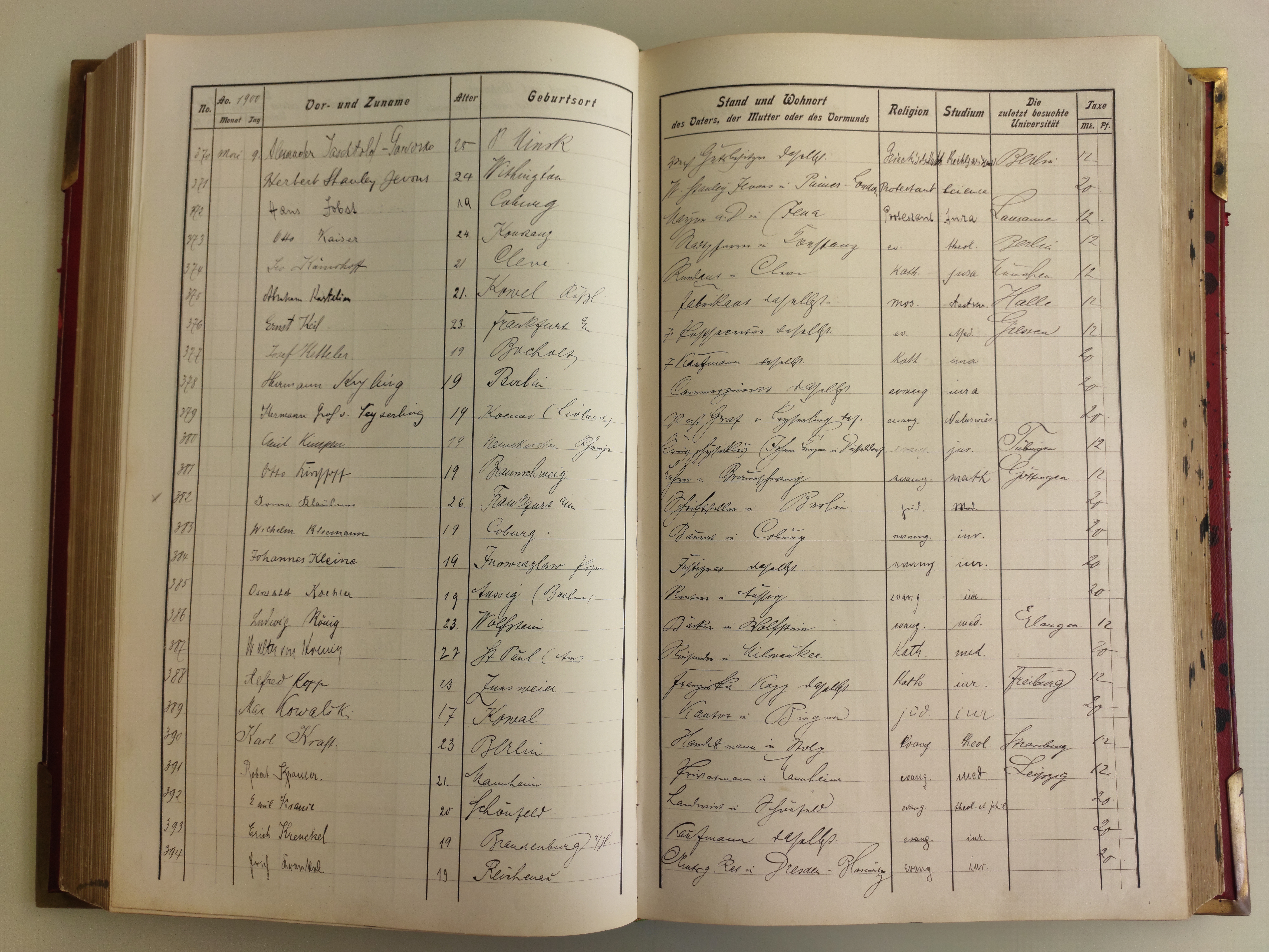 Eintrag im Matrikelbuch der Universität Heidelberg aus dem Jahr 1900 von Irma Klausner